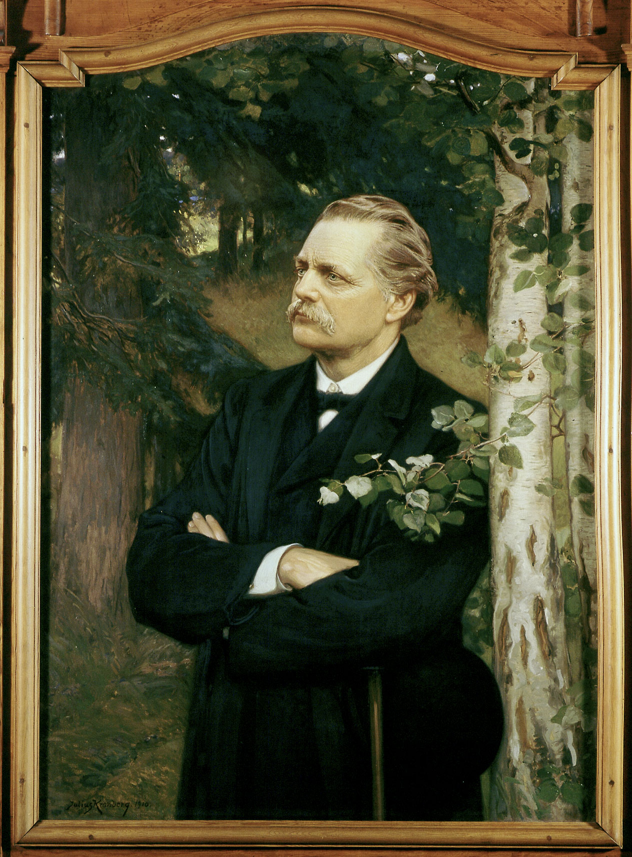 Artur Hazelius (1833-1901)